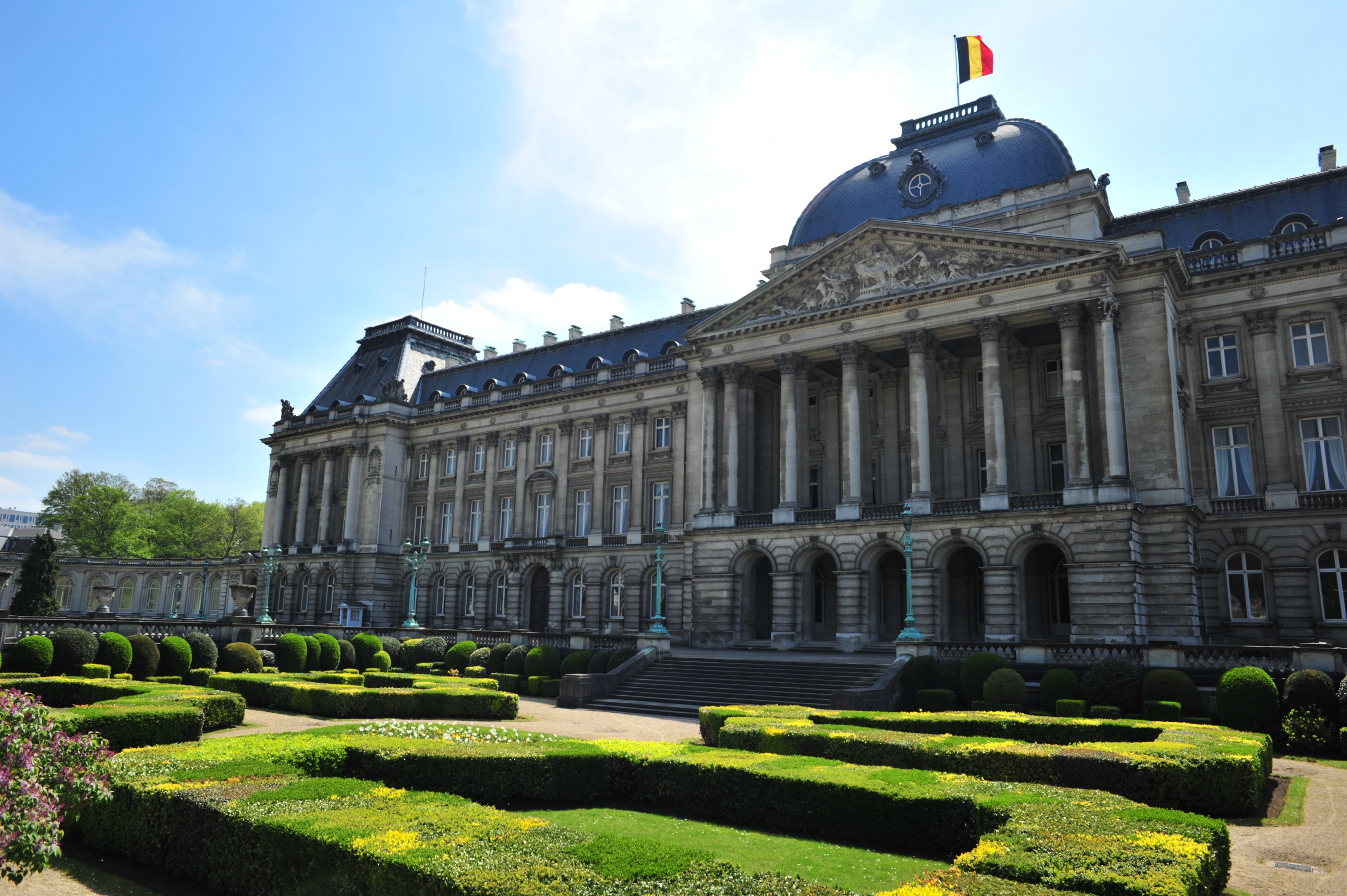 Palais royal de Bruxelles